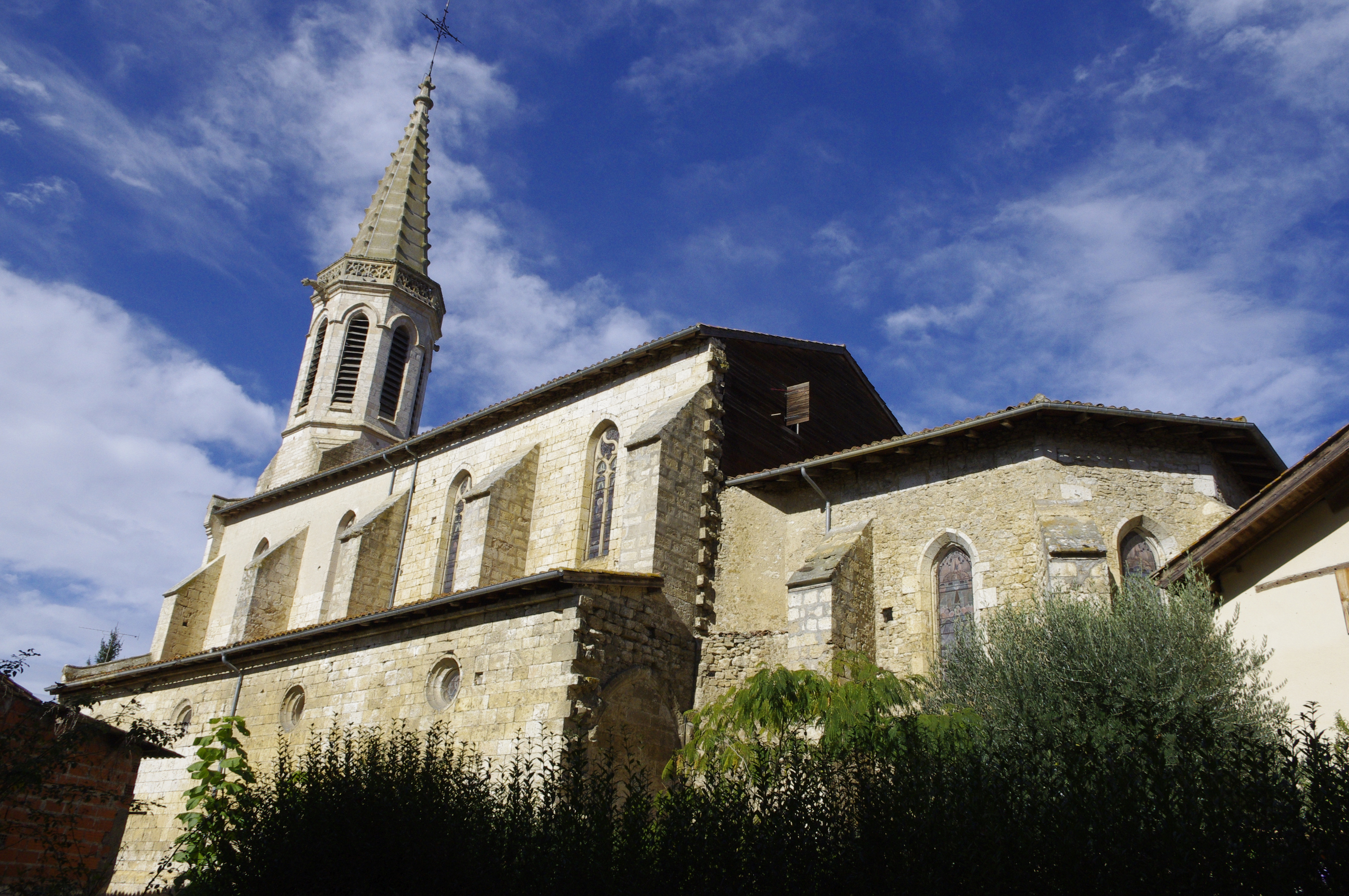 Sarrant, Gers, France.